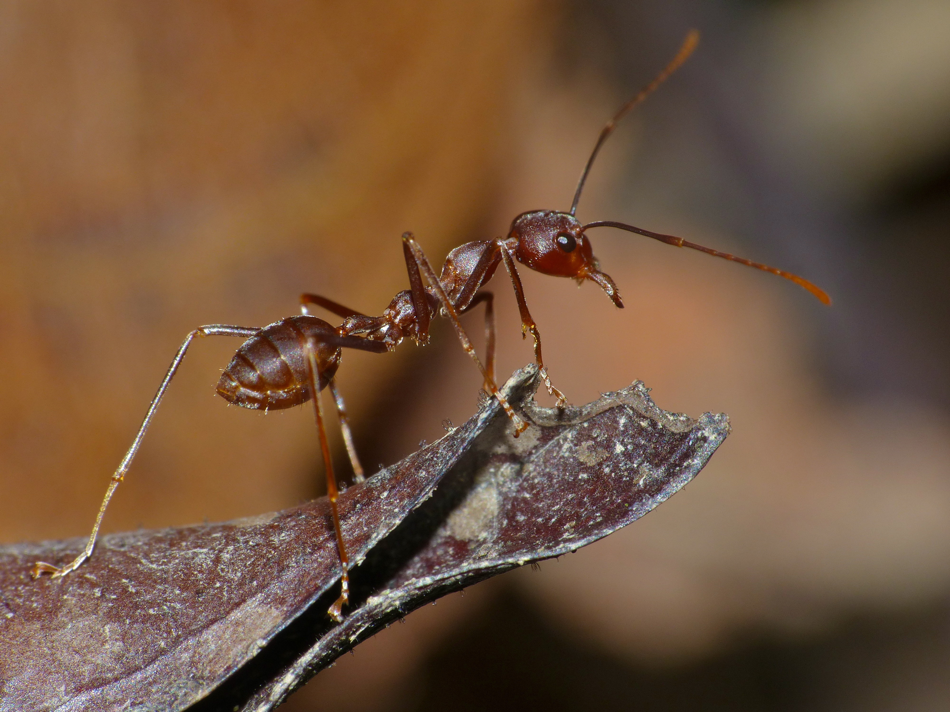 Night Walk Trail, Mulu NP, Sarawak, MALAYSIA